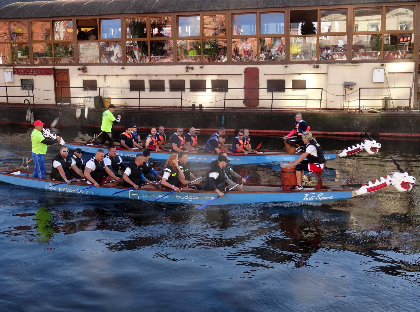 XXV Wielka Wioślarska o Puchar Brdy 2016, wyścig smoczych łodzi (policja, centrum szkolenia NATO)